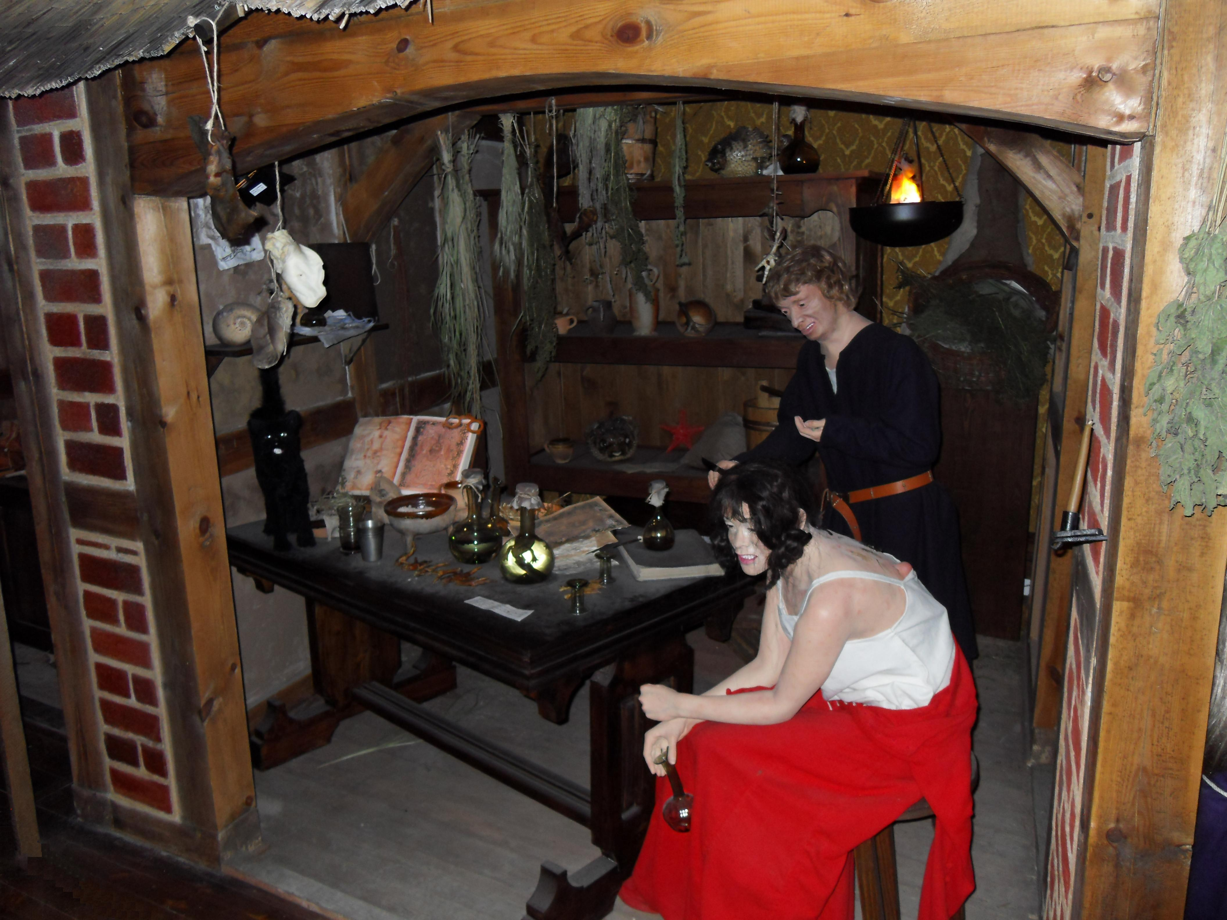 Gdańsk, Wyspa Spichrzów. Ul. Chmielna, spichlerz Błękitny Baranek - inscenizacja.